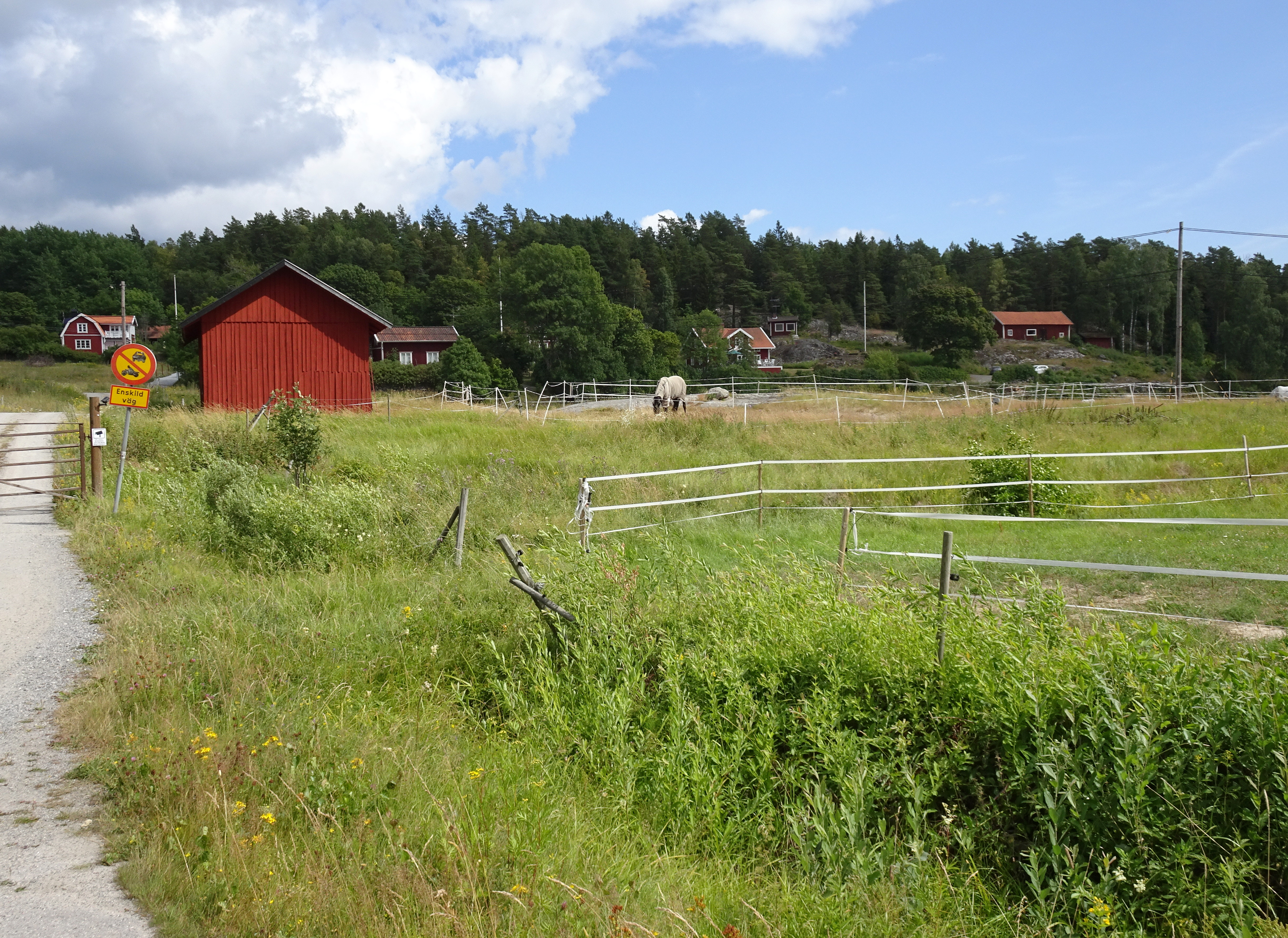 Byggnader och kulturlandskapet i Vissvass, Tyreö kommun